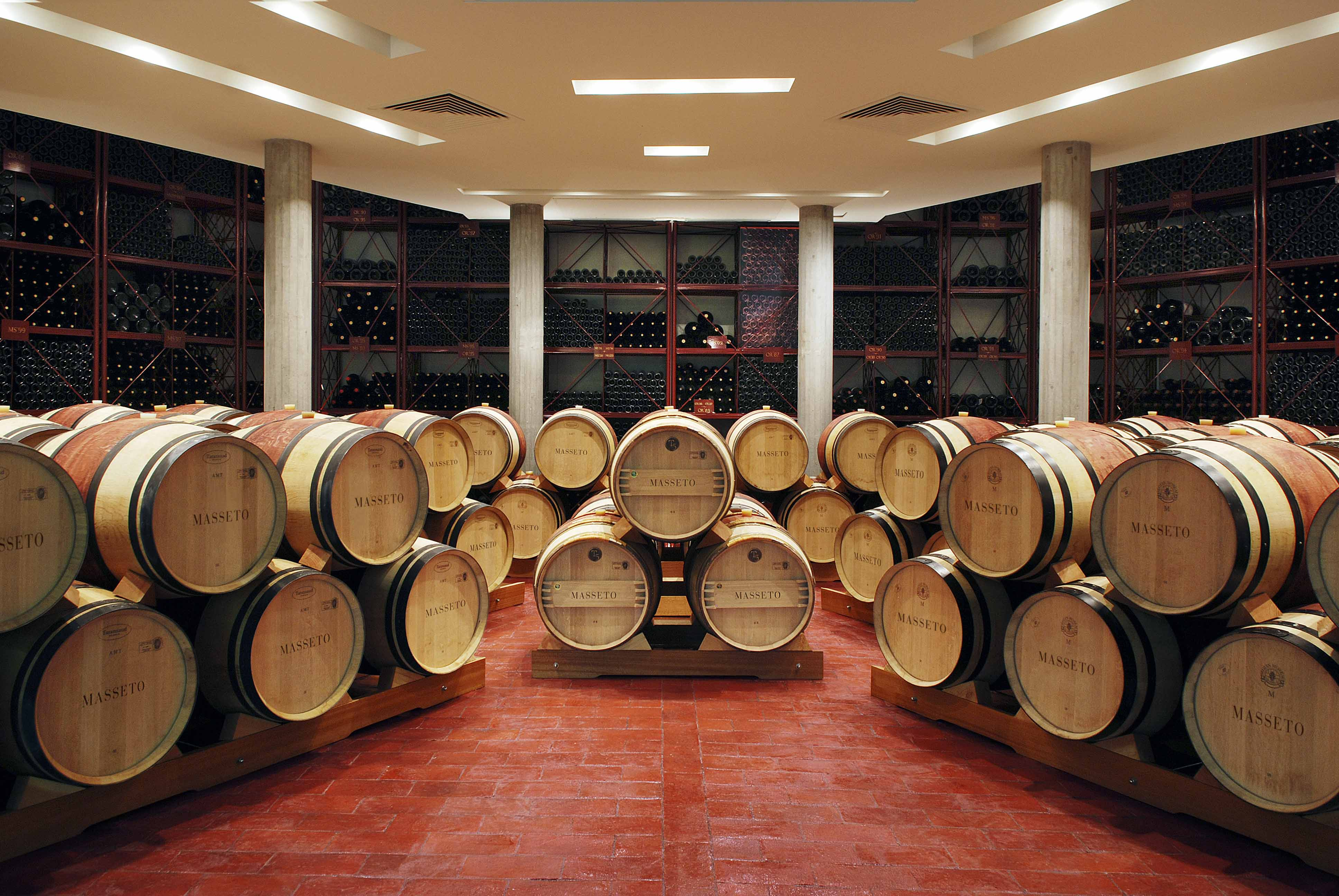 Botti di vino